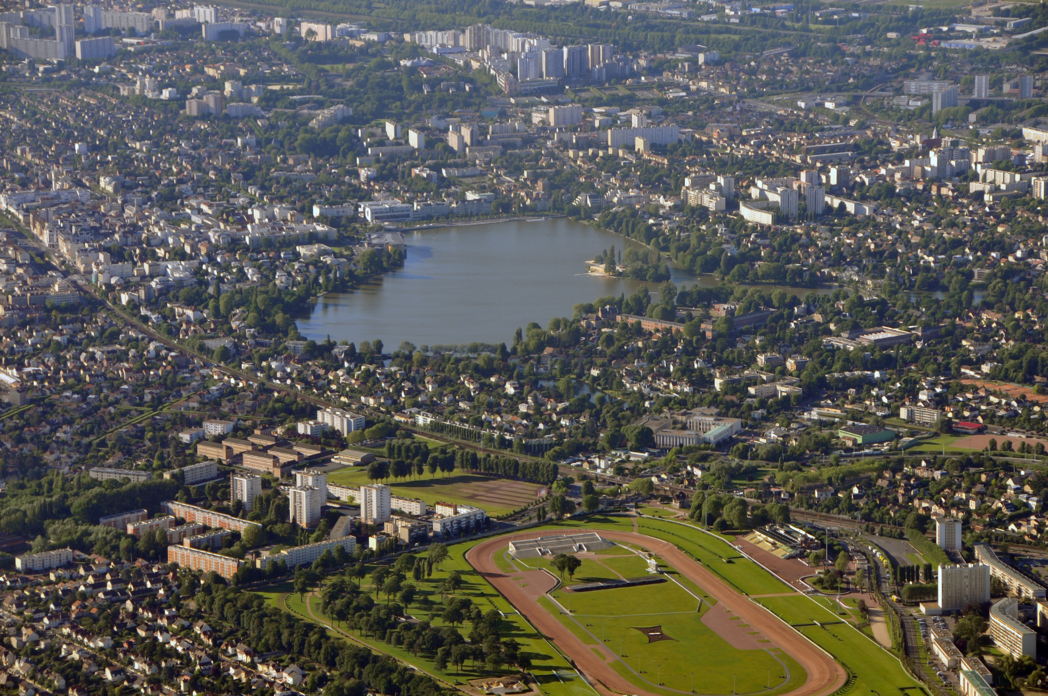 Vue aérienne d'Enghien-les-Bains (Val-d'Oise, France) et de son lac.